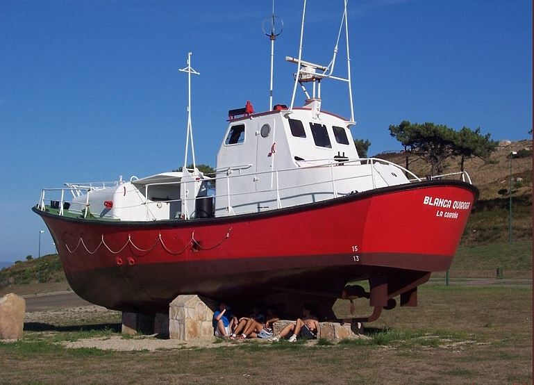 Embarcación de salvamento marítimo Blanca Quiroga, A Coruña La embarcacion de salvamento maritimo Blanca Quiroga, pertenecio durante muchos años a la Cruz Roja y teniendo como base el Puerto de A Coruña participo en muchos salvamentos. La jubilaron y ahora descansa en el Parque de Bens a las afueras de la ciudad, y para algunos aun sigue siendo util